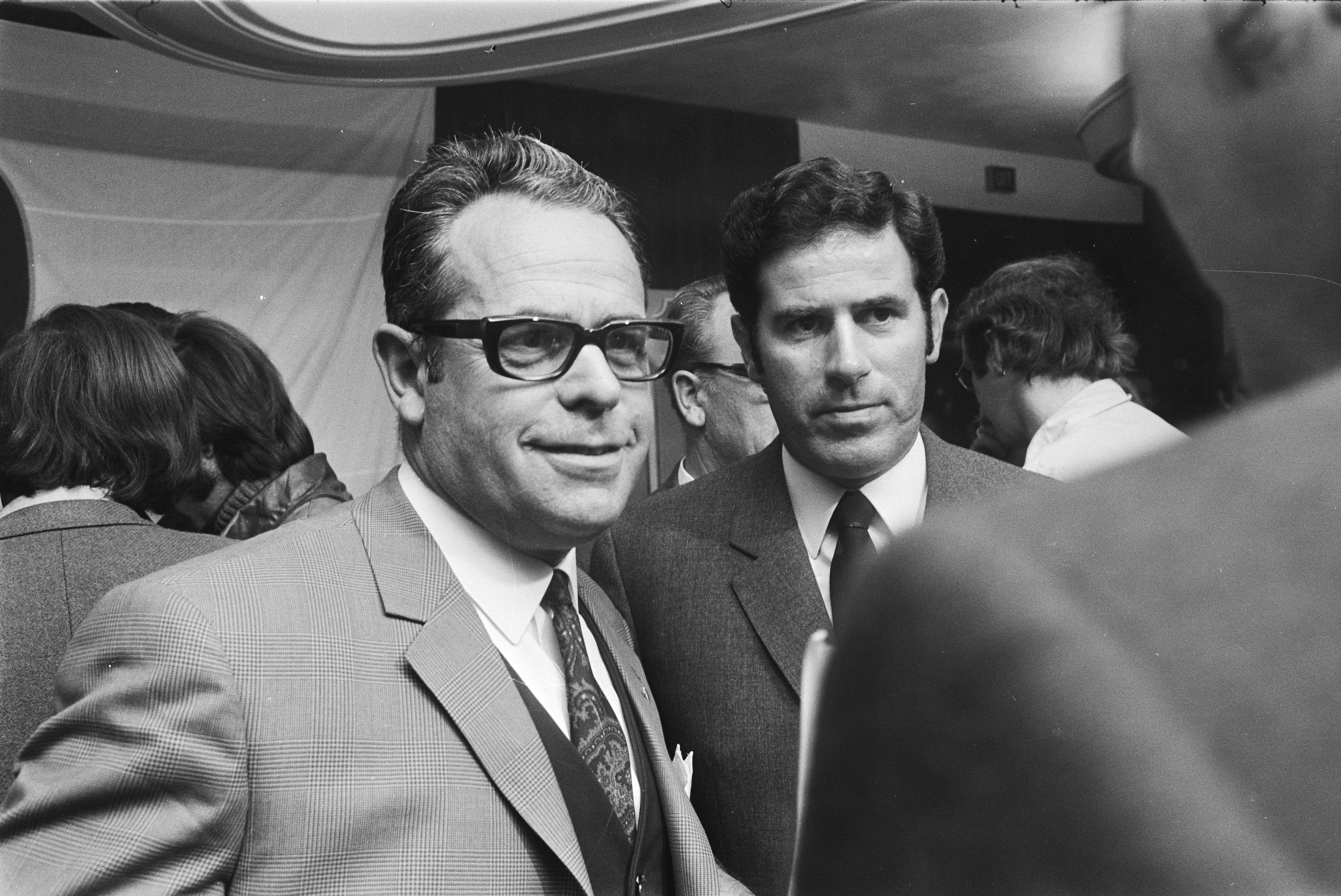 Collectie / Archief : Fotocollectie Anefo Reportage / Serie : [ onbekend ] Beschrijving : Loting voor achtste finale van Europa Cup 1 en 2 in Caransa Hotel te Amsterdam; links F. Musfeld (president FC Basel) en rechts A. Kraan Datum : 6 oktober 1970 Locatie : Amsterdam, Noord-Holland Trefwoorden : lotingen, presidenten, sport, voetbal Persoonsnaam : Caransa Hotel, Kraan A. Instellingsnaam : AJAX Fotograaf : Koch, Eric / Anefo Auteursrechthebbende : Nationaal Archief Materiaalsoort : Negatief (zwart/wit) Nummer archiefinventaris : bekijk toegang 2.24.01.05 Bestanddeelnummer : 923-9002